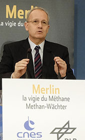 Jean-Yves Le Gall donnant une conférence sur le satellite franco-allemand MERLIN (Methane Remote Sensing Lidar Mission)